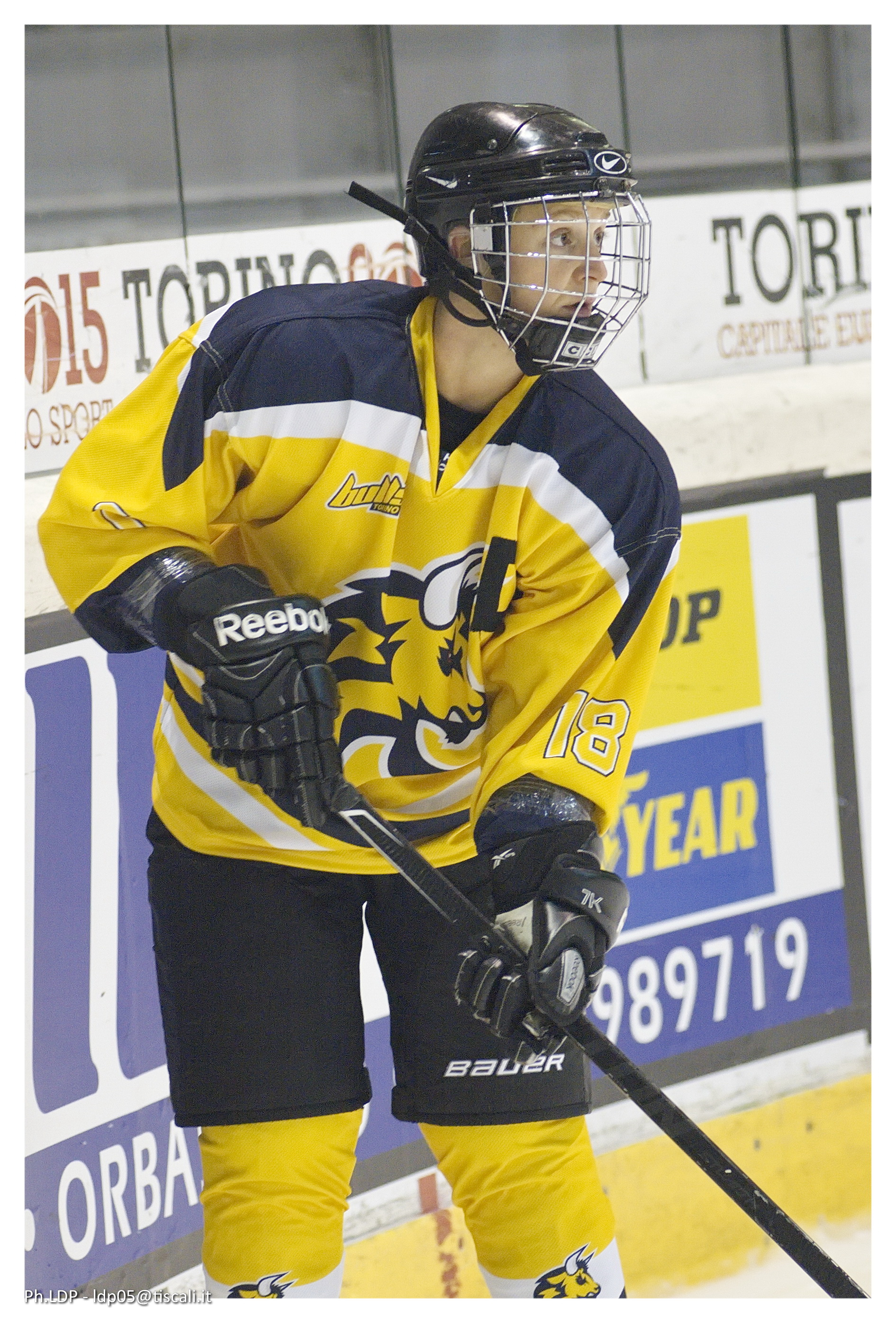 incontro tra Torino Bulls e EV Bozen' Eagles valevole per il campionato di serie A femminile del 8 novembre 2014